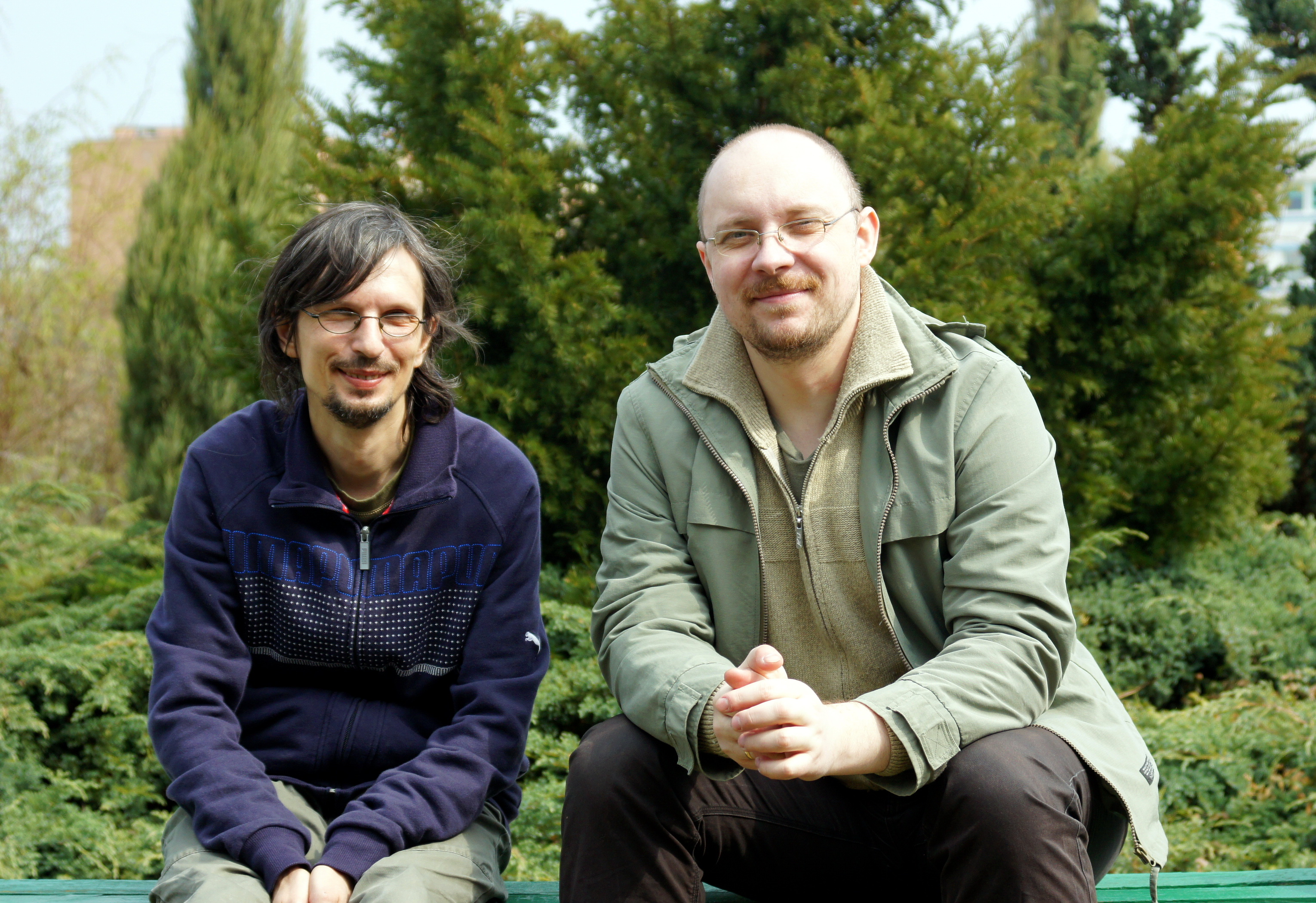 Mariusz Stoppel (z lewej) i Bartłomiej Siwiec, Bydgoszcz 2011.